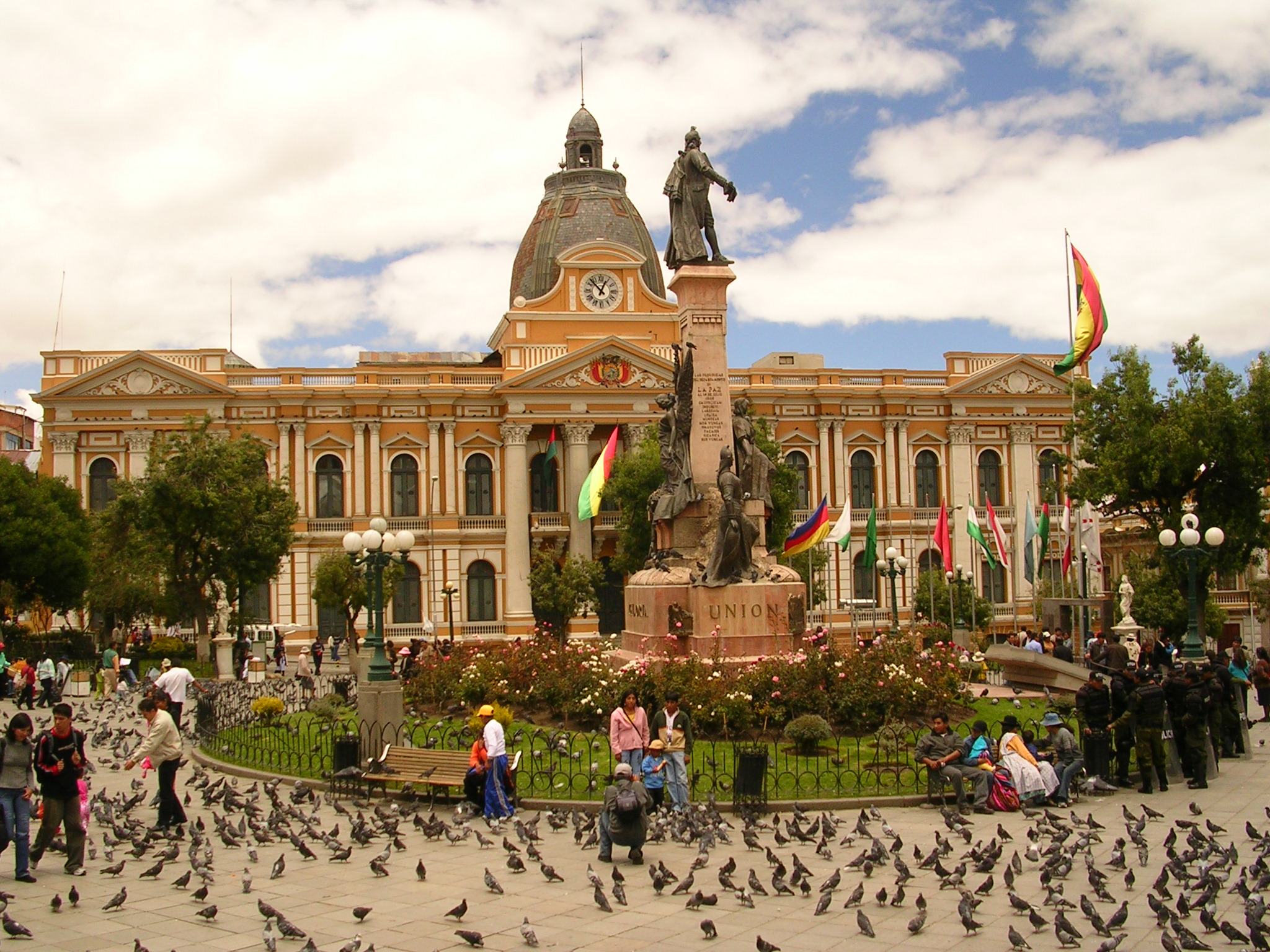 Plaza Murillo con el Palacio Quemado de fondo en La Paz